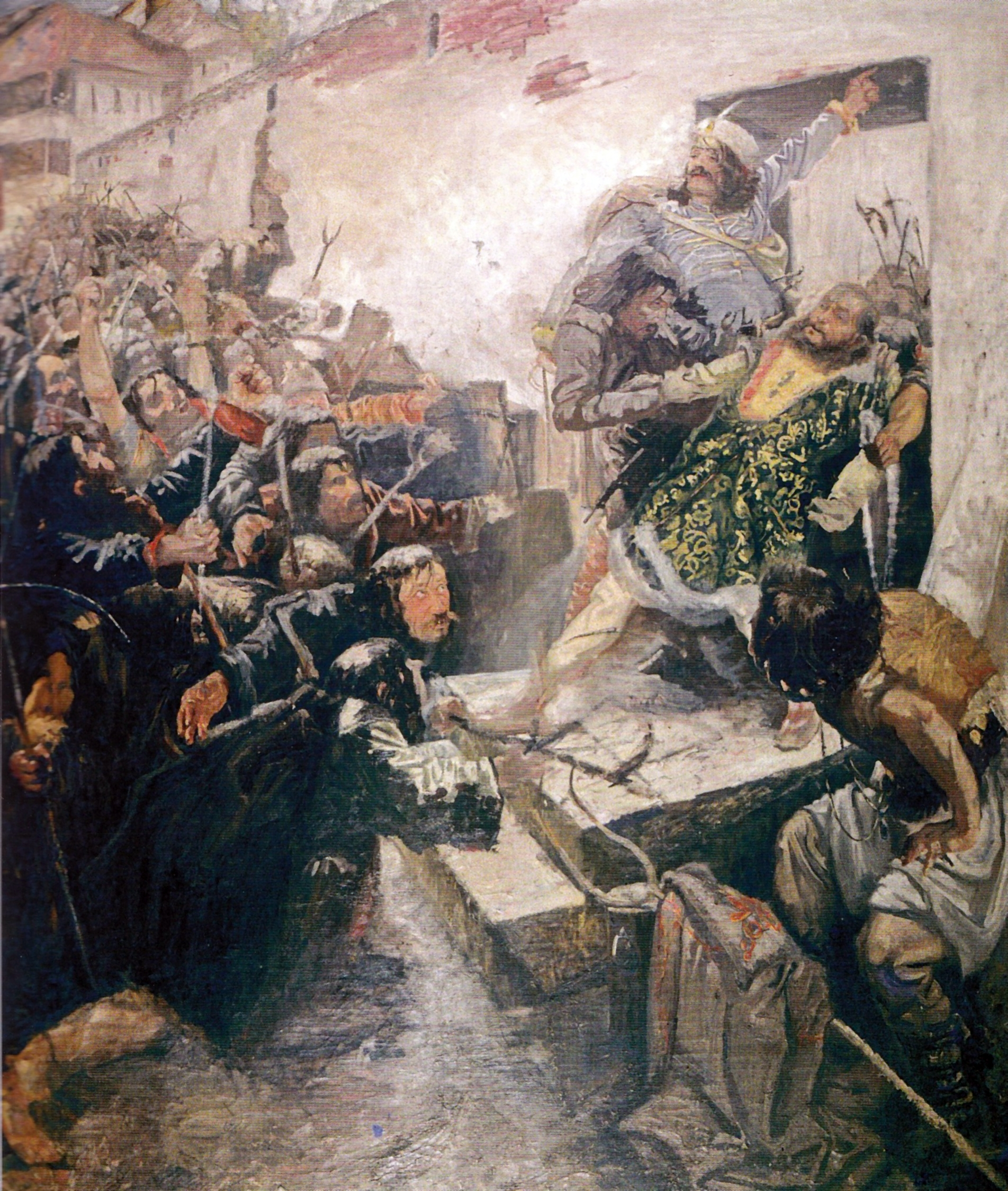 Abgar Baltazar (1880-1909) – “Capul lui Moţoc, vrem!” – ulei pe pânză, 2,5 x1,72 m, Colecţia Muzeului Naţional de Artă.